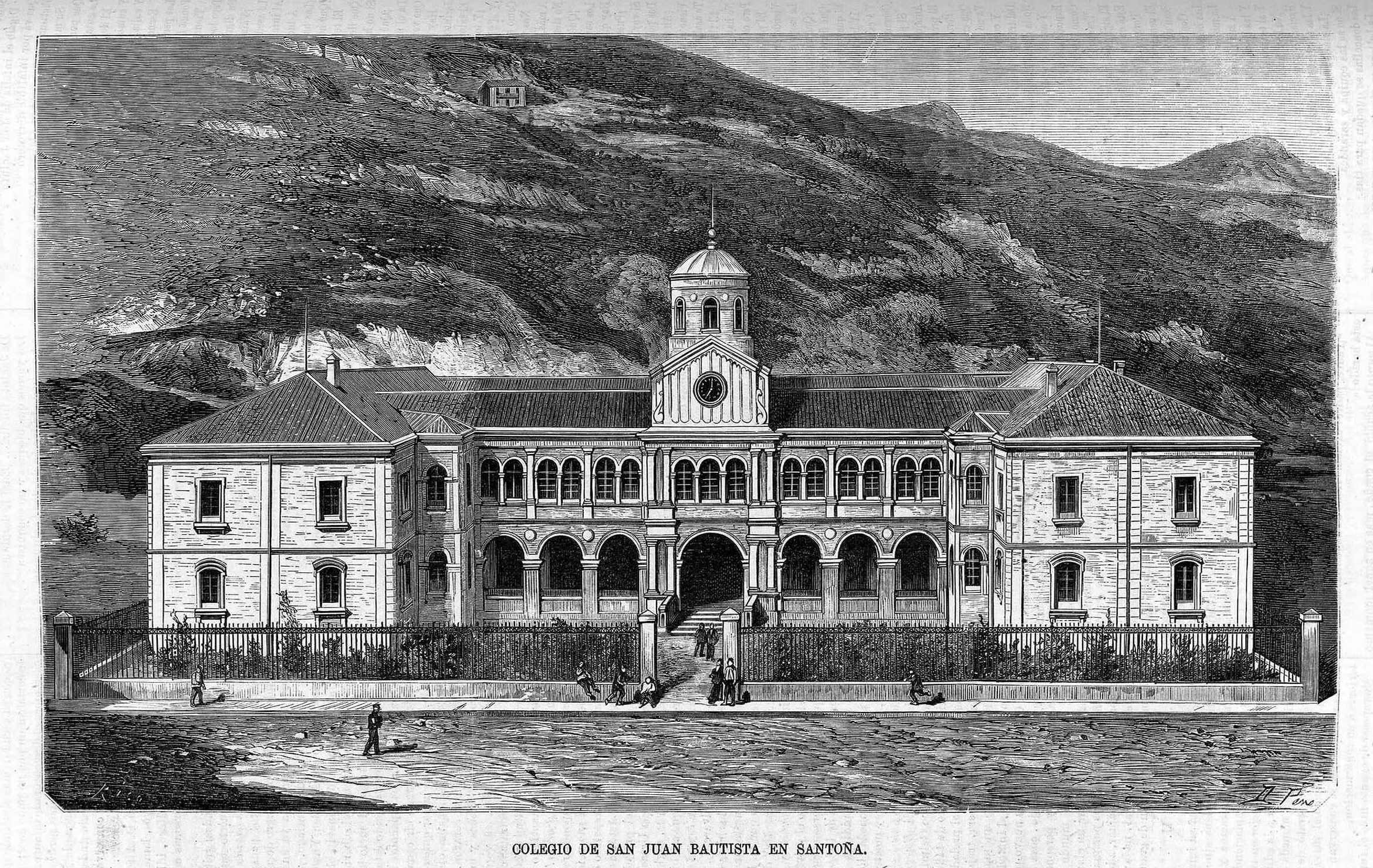 Colegio de San Juan Bautista en Santoña.